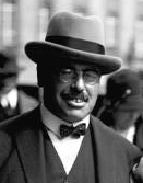 Interessante Politiker auf dem Wege zum neuen Reichstag! Der sozialdemokratische Abgeordnete und voraussichtliche Finanzminister Hilferding begibt sich mit seiner Gattin zum Reichstag. Information added by Wikimedia users.Rudolf Hilferding